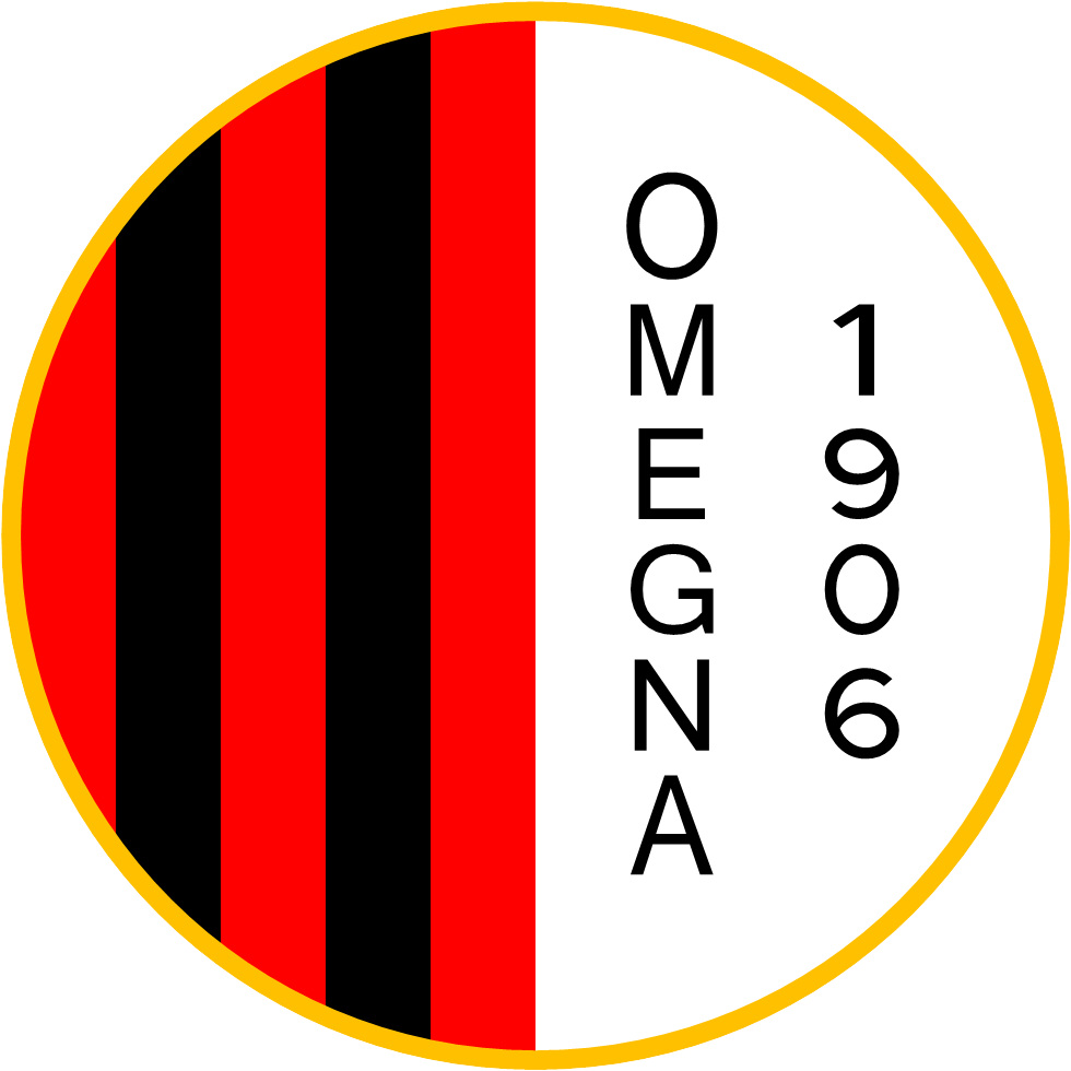 LOGO OMEGNA 1906